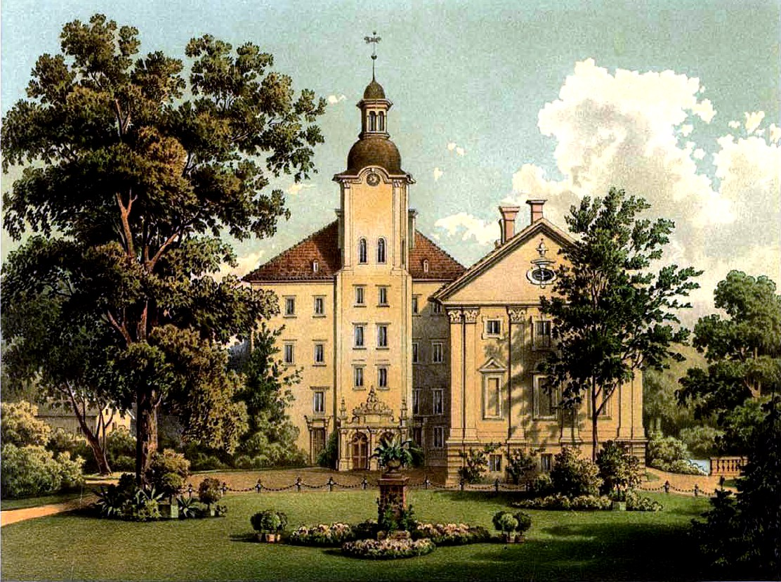 Gut Schlesisch-Halbau, Kreis SaganProvinz Schlesien